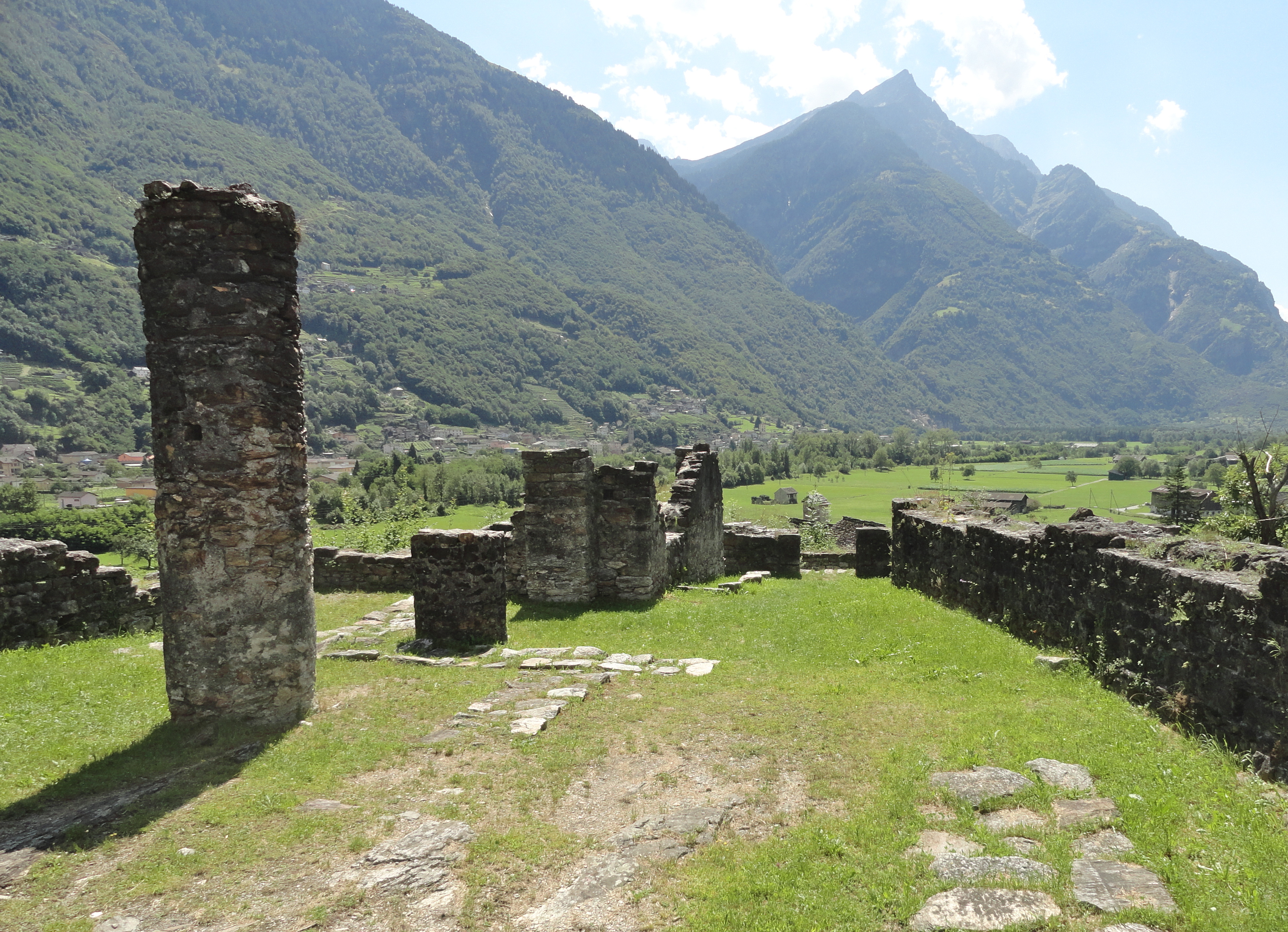 Serravalle (Burg)